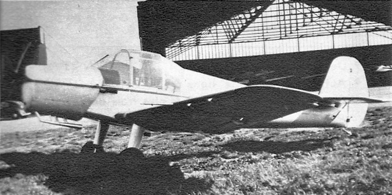 Starck AS-57